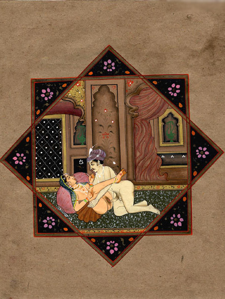 Kama Sutra Illustration